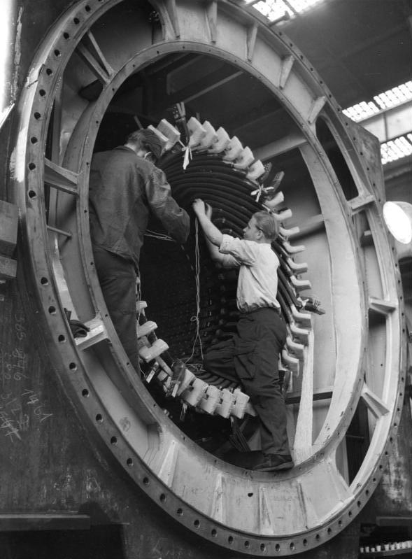 West-Berlin Wicklungseinbau im Generatorenbau in der AEG-Turbinenfabrik